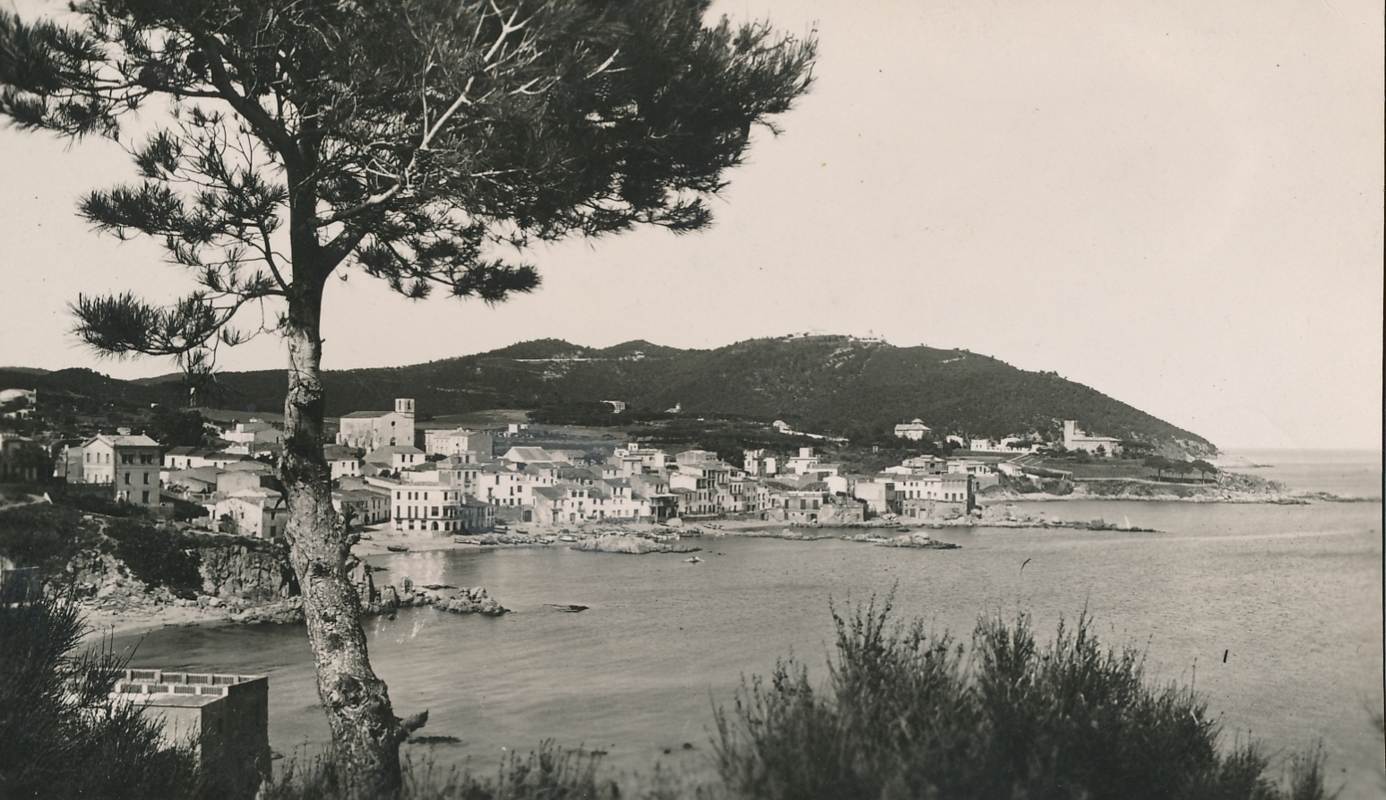 Palafrugell (Girona), 1943 Procedencia: Archivo Fotográfico de la Dirección General de Turismo (1940-1992) Fotógrafo: Juanola Registro nº: 01240 Signatura: Caja 13 Fondos: Biblioteca de la Facultad de Empresa y Gestión Pública (Universidad de Zaragoza) Legado: Luis Fernández Fuster / E.S. Turismo Huesca